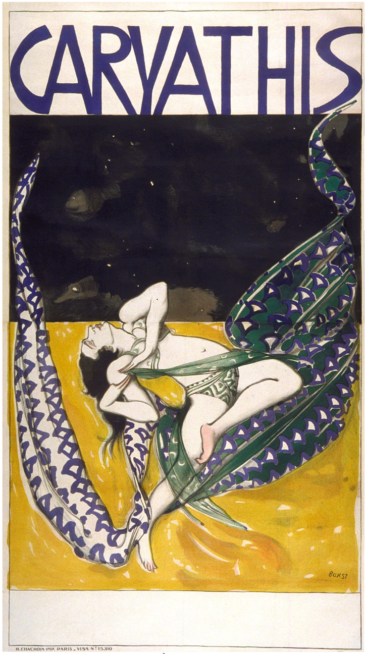 Poster for a Dance Recital by Caryathis (Elise Jouhandeau) 1919 Афиша к танцевальному рециталу Элизы Жуандо в парижском театре «Кариатид» («Caryathis») 1919